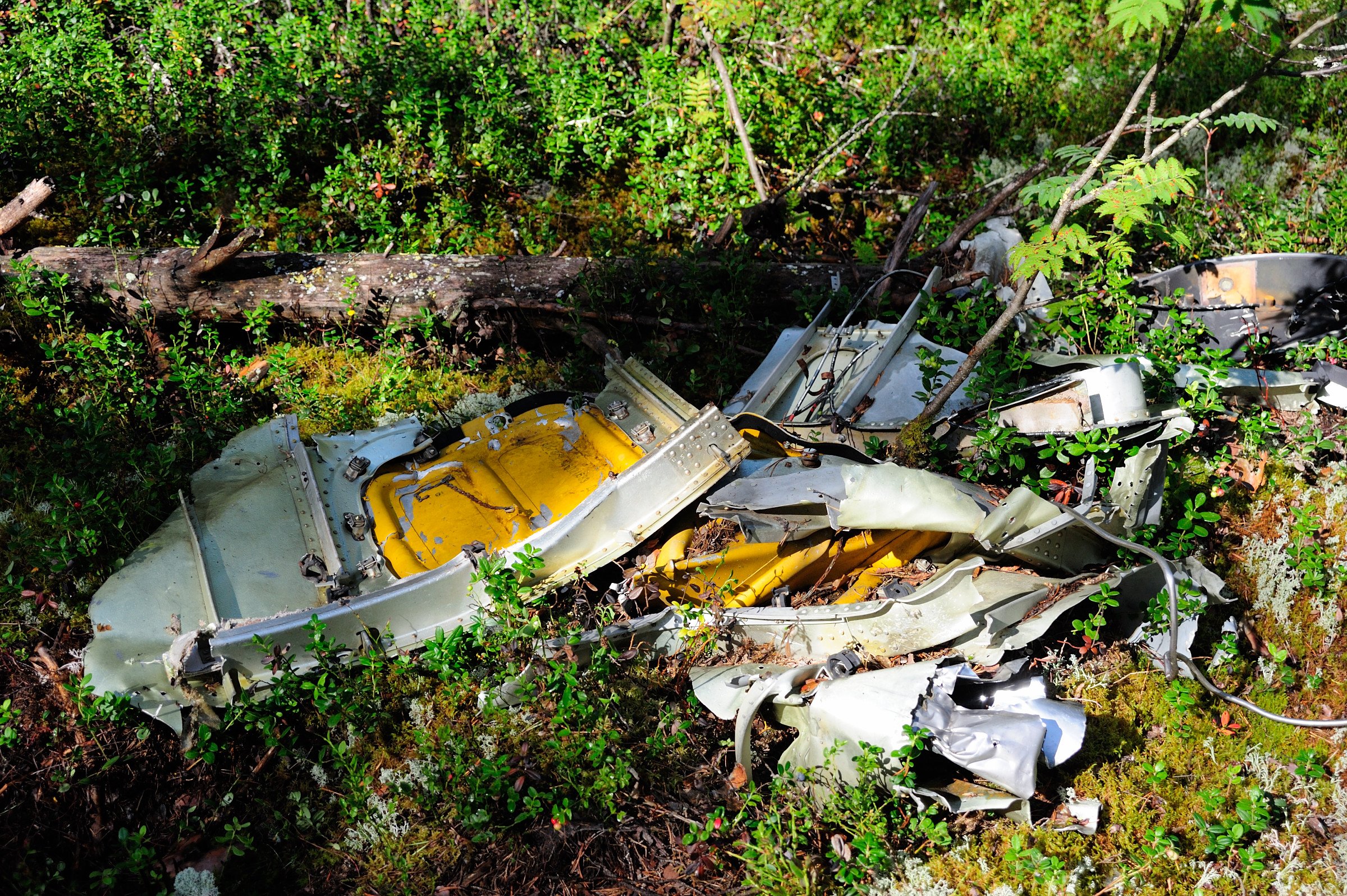 Обломки ступени ракеты-носителя Молния-М (8К78М), запущенной когда-то с космодрома Плесецк. На берегу реки Вашка, район падения "Вашка", Удорский р-н, республика Коми.